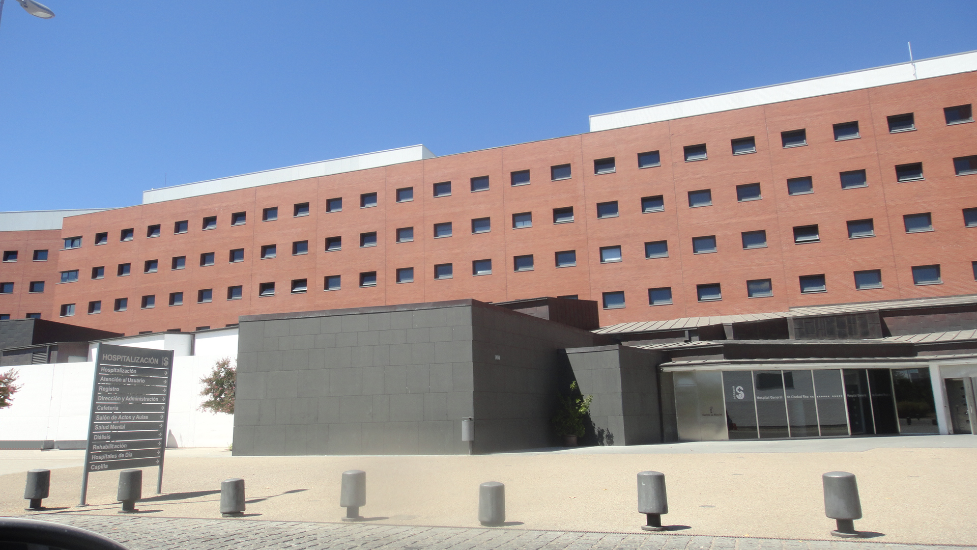 Hospital General Universitario de Ciudad Real, acceso a hospitalización. Inaugurado en 2005, en Ciudad Real - España.